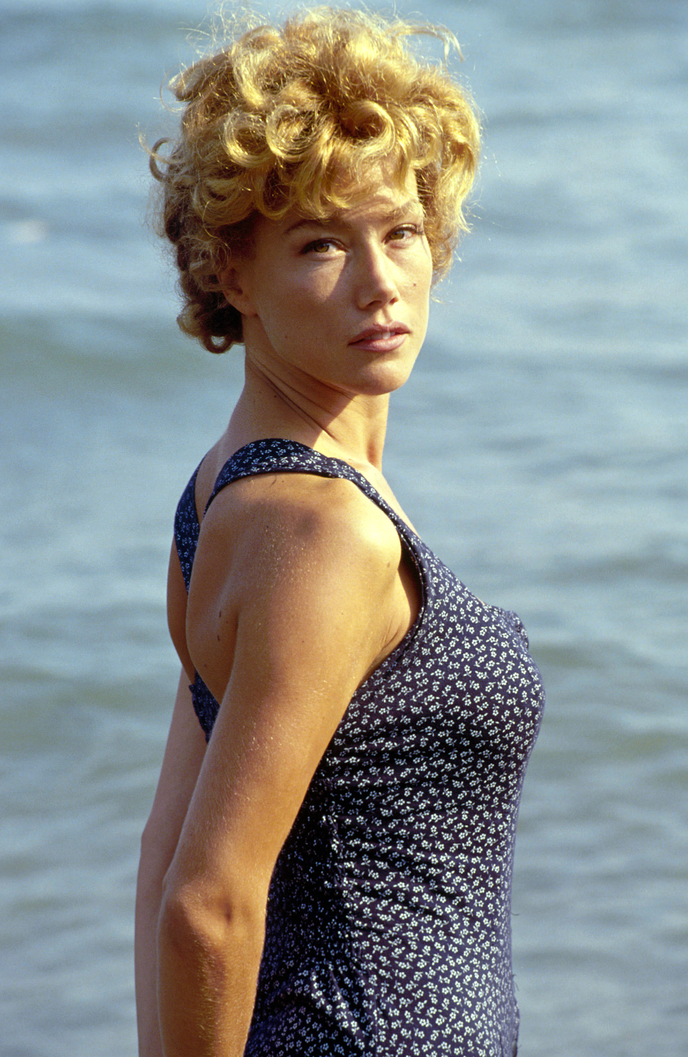 L'attrice Nancy Brilli alla Mostra del Cinema di Venezia del 1988